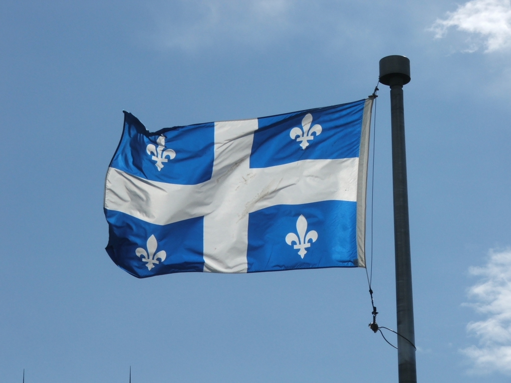 Drapeau du Québec. Les deux pointes en bas de l'image sont celles du château Frontenac.